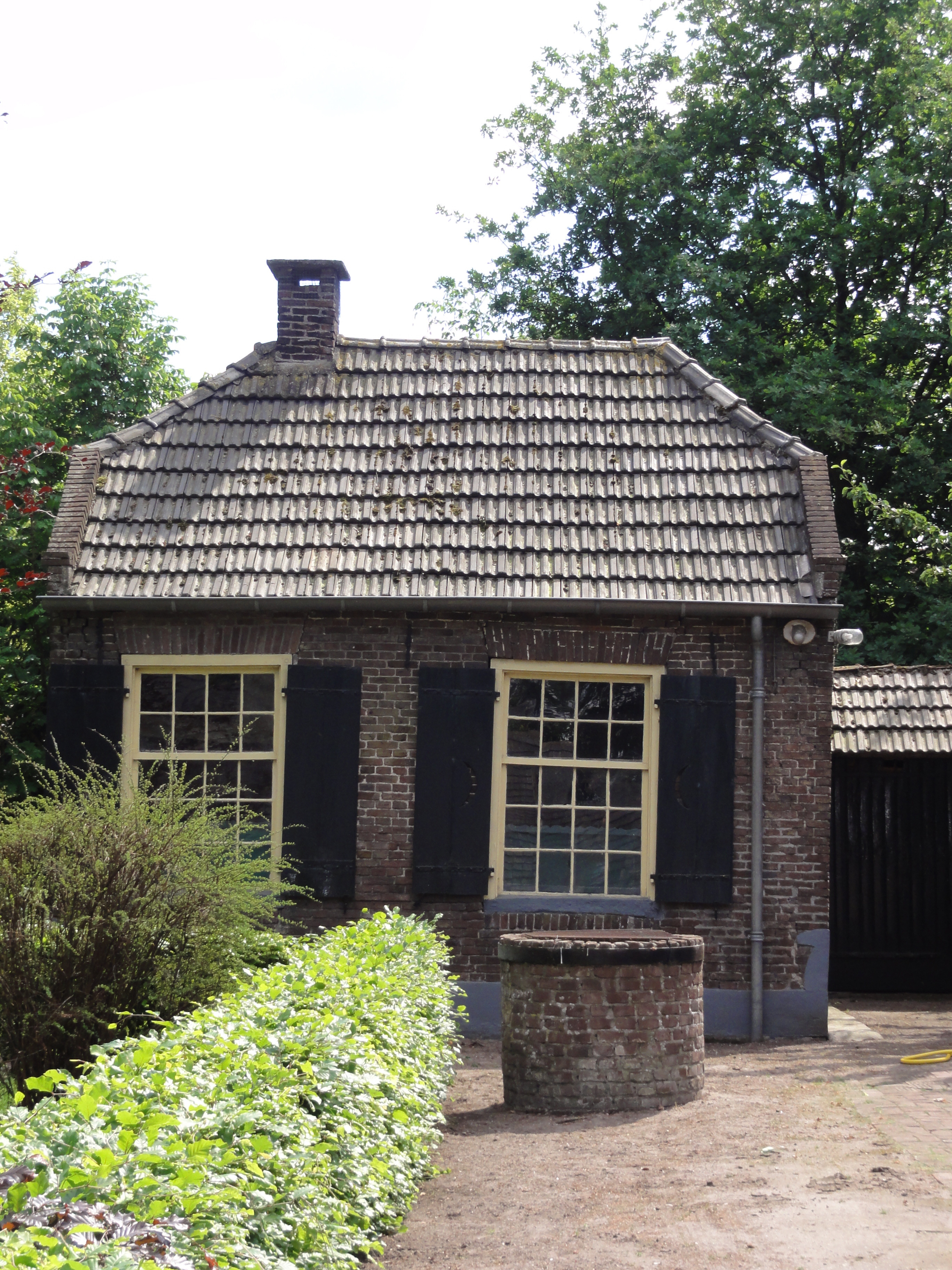 Boekel